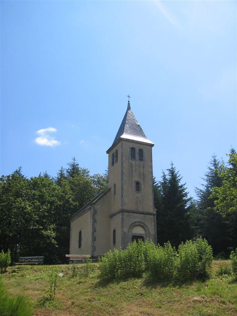 La Chapelle du Banquet de la commune de Mhère dans le département de laNièvre. Photo prise en juillet 2005 par Utilisateur:Jgremillot